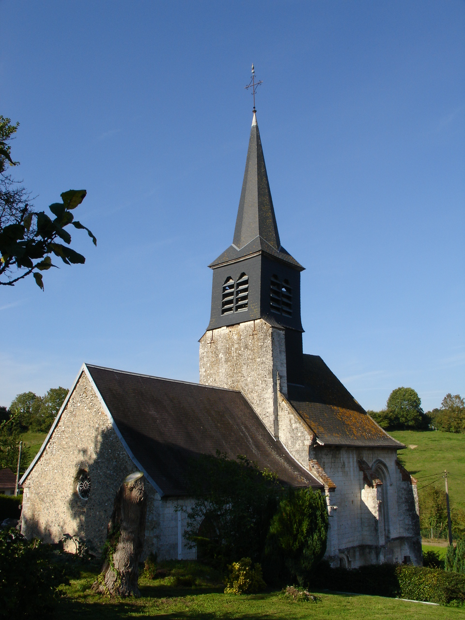 Église de Saint-Denoeux .